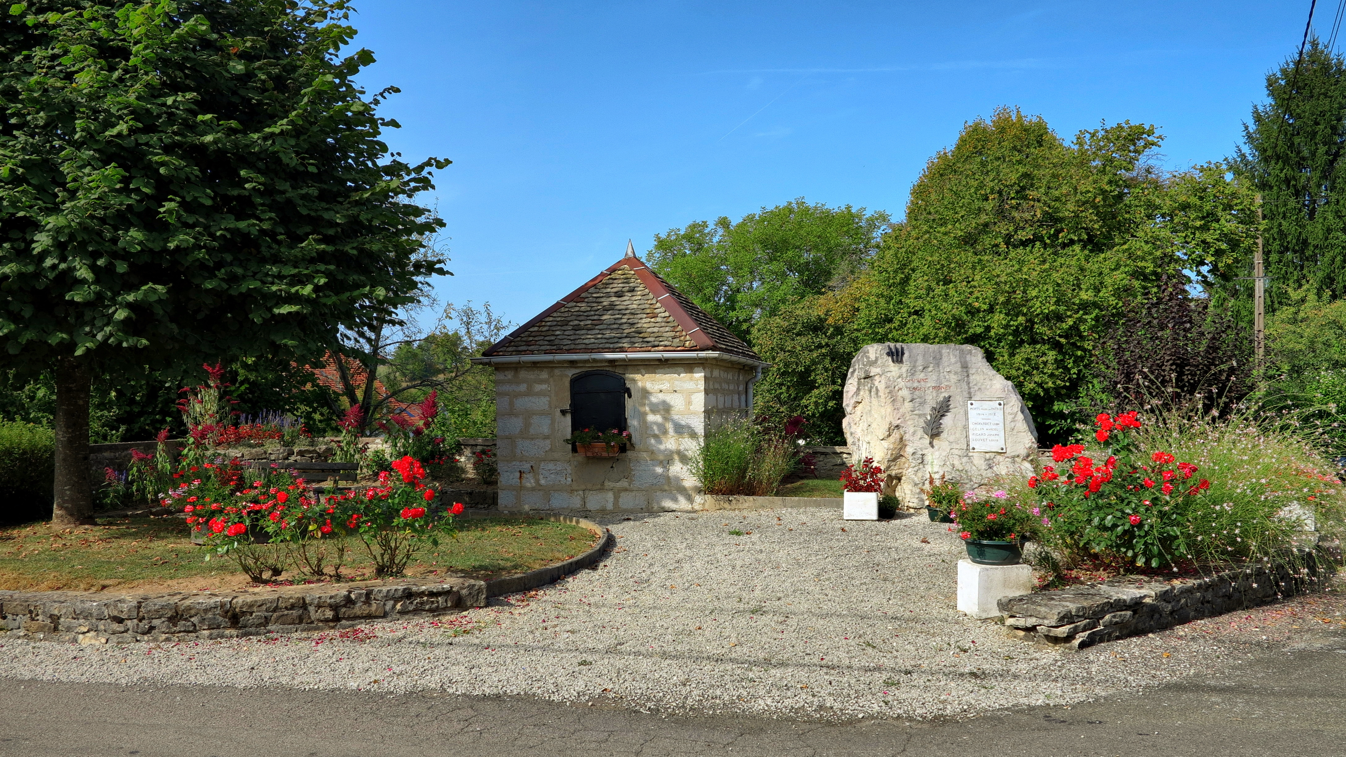 La fontaine